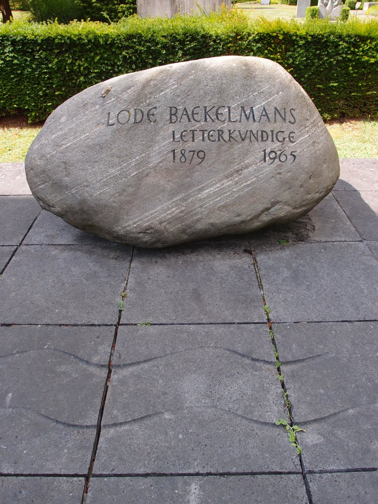 Grab des Schriftstellers Lode Baekelmans, 1879-1965, auf dem Friedhof Schoonselhof in Antwerpen